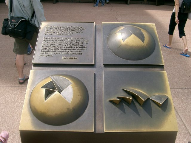 Placa con la explicación de las bóvedas de la Ópera House de Sydney